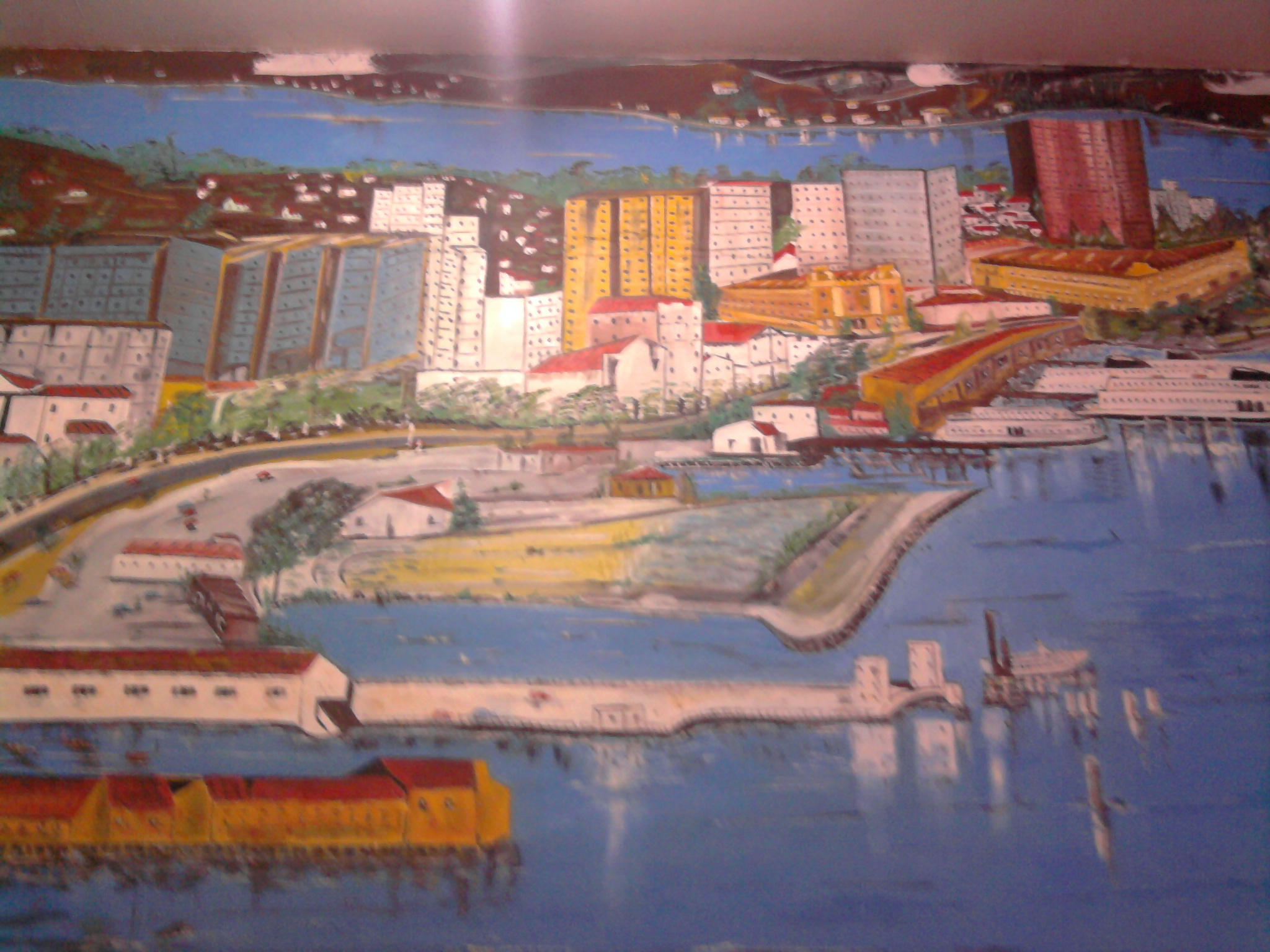 mural no Mercado São Pedro, em Niterói, que retrata a antiga orla do Centro da cidade antes do Aterro Praia Grande. No canto abaixo o antigo mercado a beira-mar